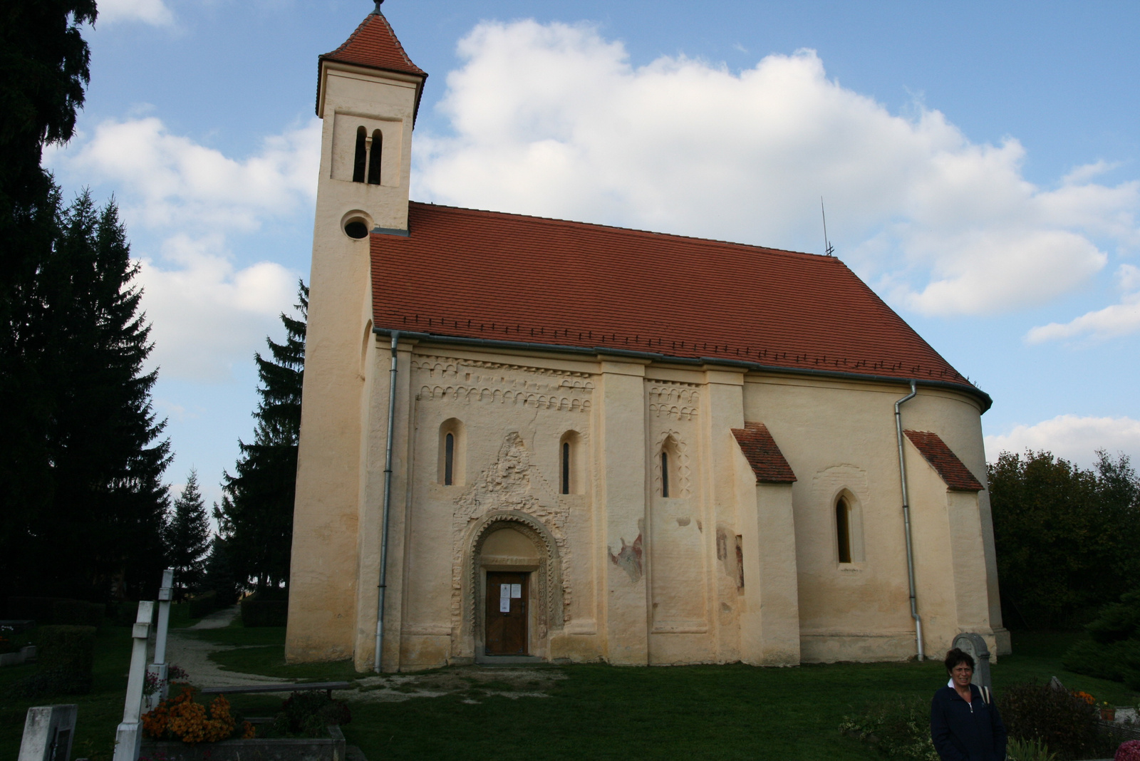 Szent Péter apostol római katolikus templom (Őriszentpéter, Templomszer)